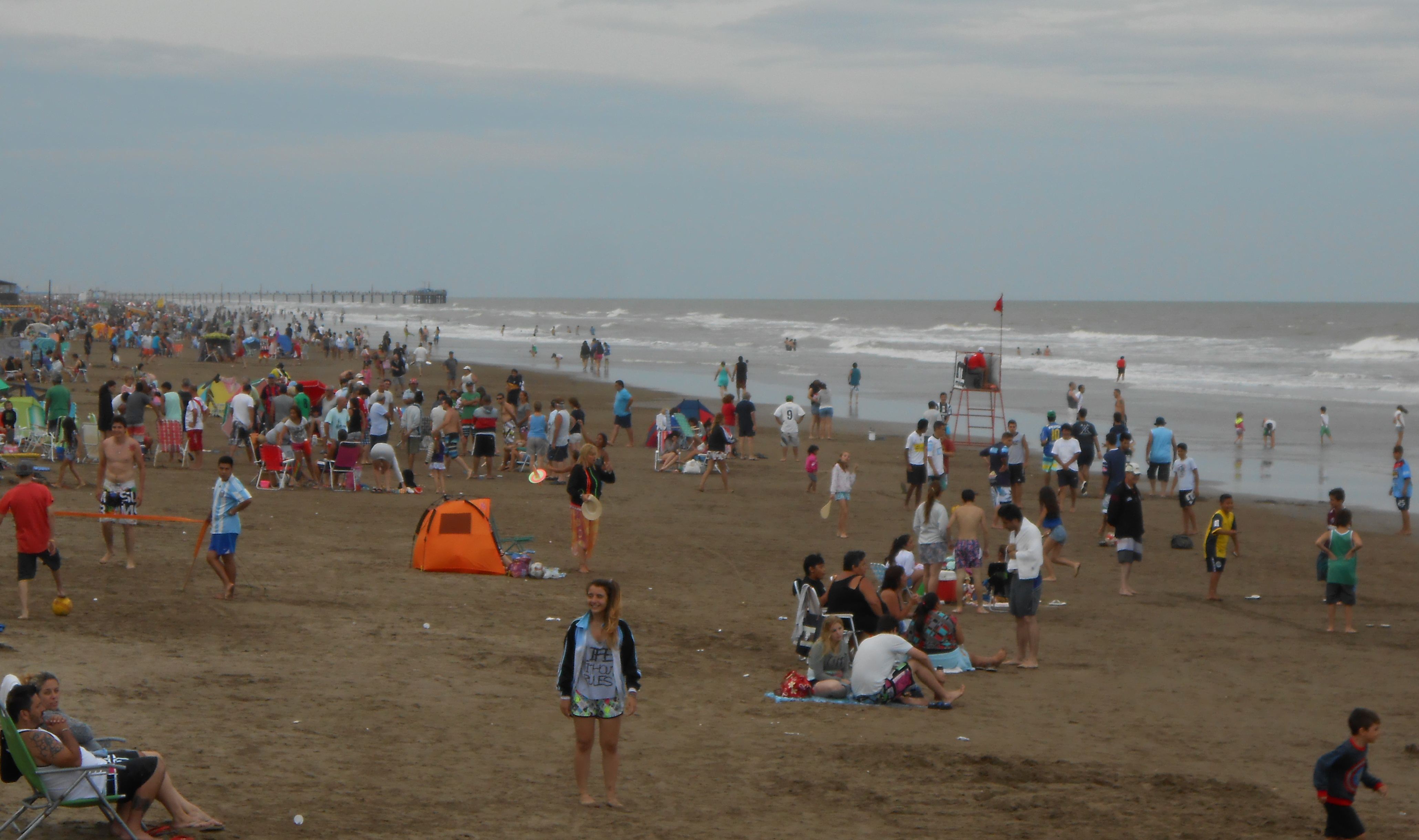 La costa de Santa Teresita desde la bajada principal. Prov. de Buenos Aires, Argentina